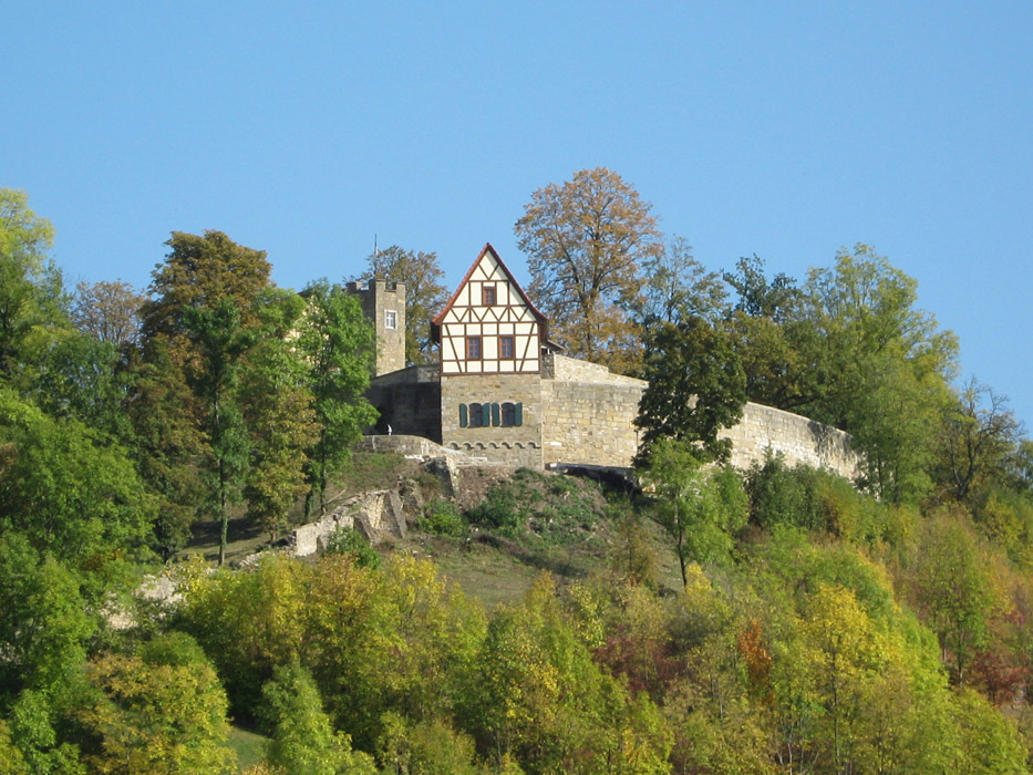 Westansicht der heutigen Burganlage auf dem Schlossberg (Königsberg i. Bay.)